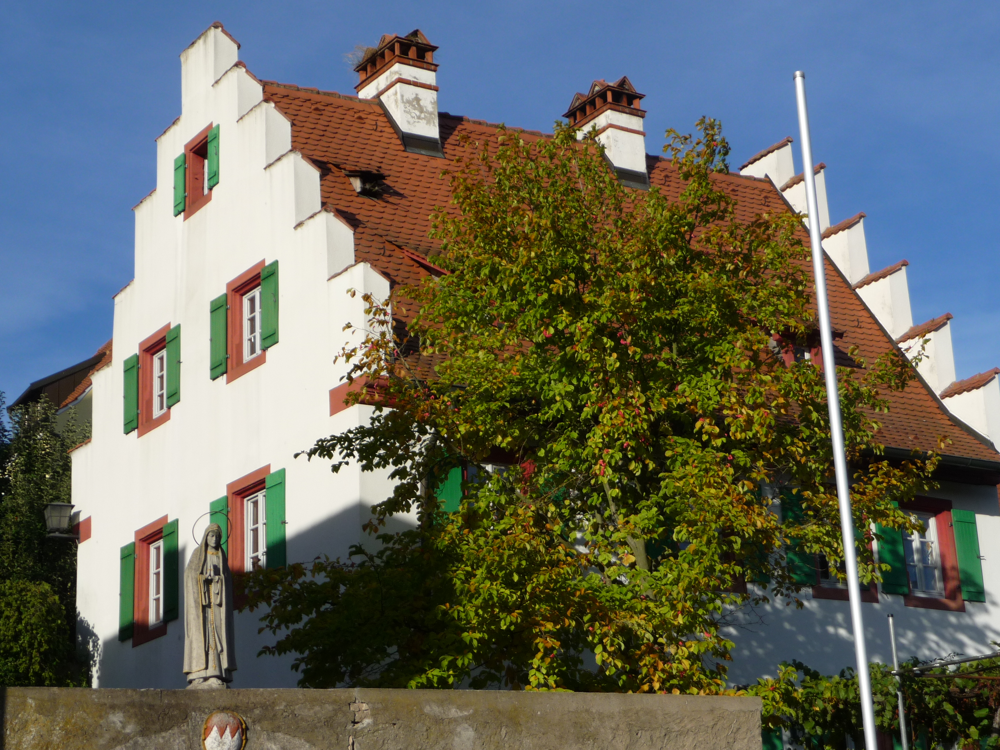 Pfarrhaus in Theilheim